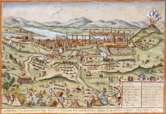 Buda ostroma 1598-ban. Rézmetszet. Hieronymus Ortelius: Chronologia oder Historische beschreibung aller Kriegs empörungen und belägerungen der Stätt und Vestungen